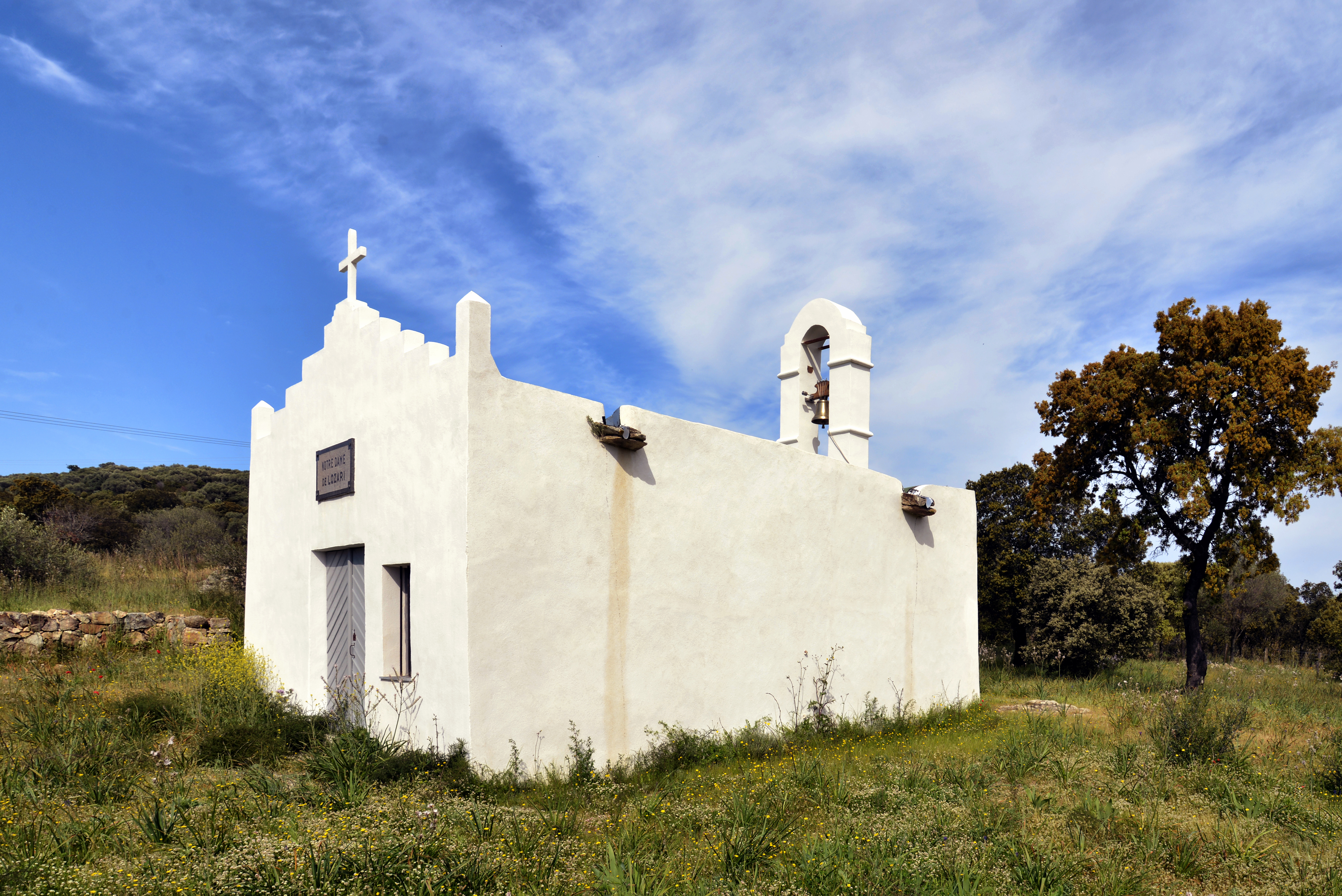 Belgodère, Balagne (Corse) - Chapelle Notre-Dame de Lozari après restauration